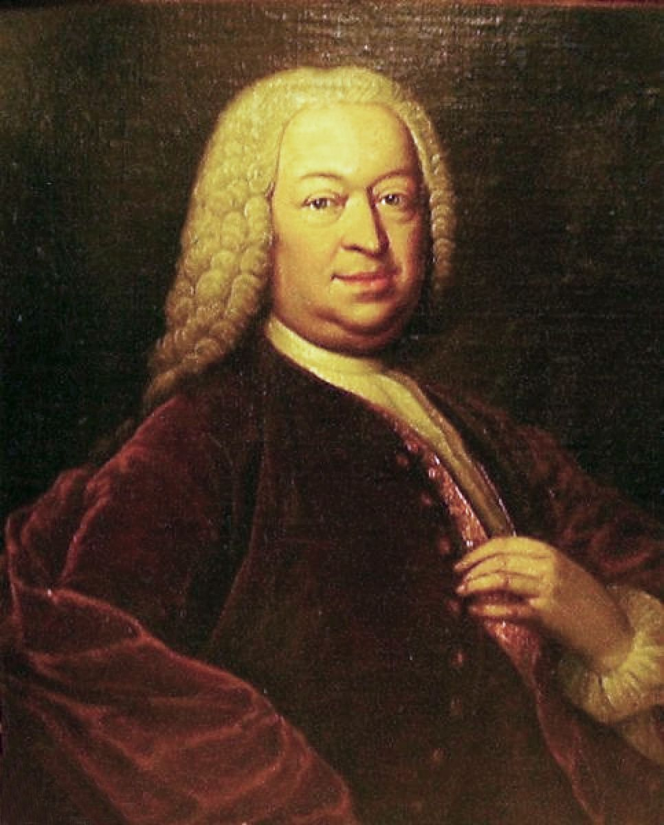 Gottfried Wilhelm Küstner, Gemälde von Elias Gottlob Haußmann